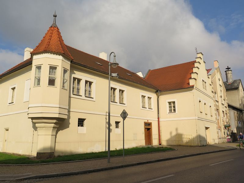 Dům čp. 7, Palackého náměstí 7, Dobrovice.